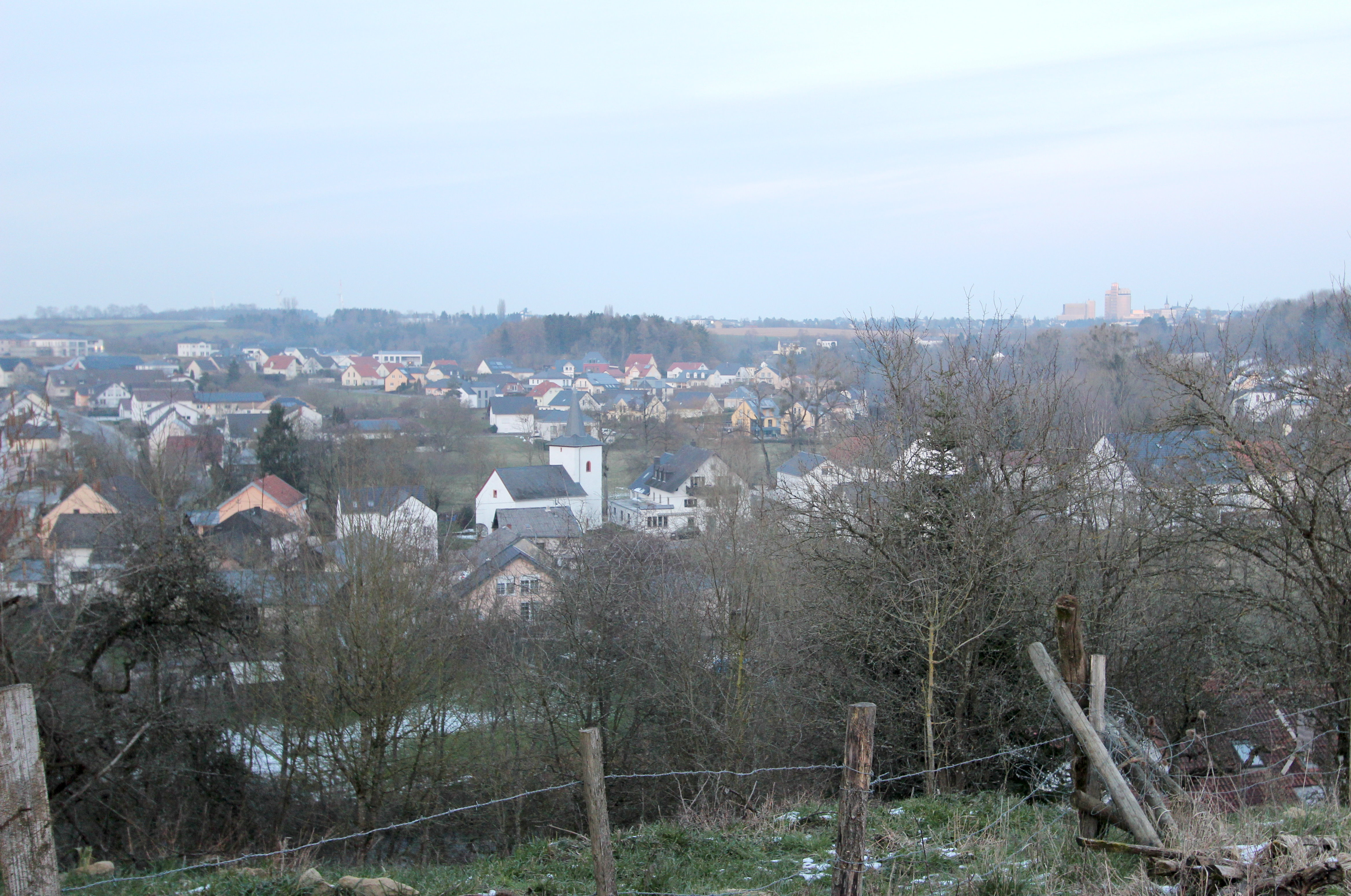 54634 Bitburg-Stahl, vorbei an Haus Im Nimstal 23. Bei Weiterfahrt erreicht man eine Anhöhe mit dem nicht eingetragenen Flurnamen "Auf Koppen". Aufnahme von 2018.